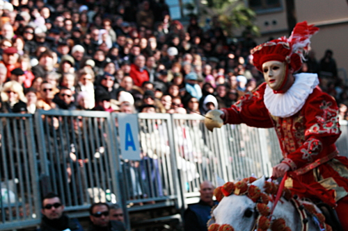 Juego de "Sartiglia" en Oristano (Italia)